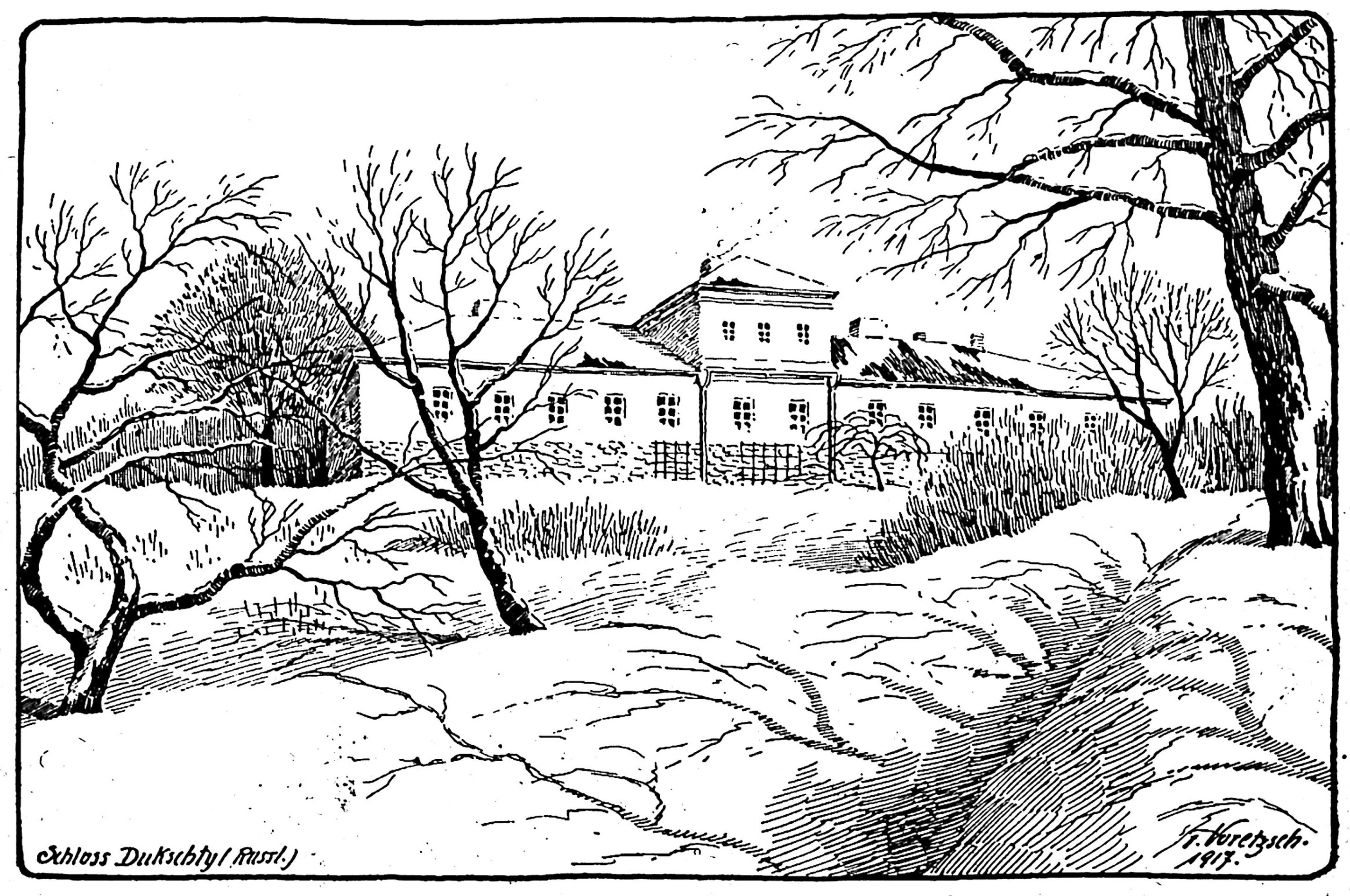 Беларуская (тарашкевіца): Дукшты, сядзіба Рудамінаў (Rudamina) і Бяганскіх (Biahanski)